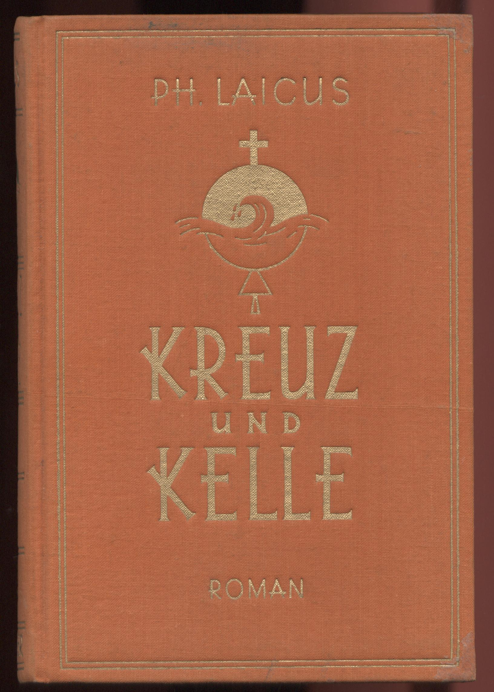 Philipp Wasserburg = Philipp Laicus, kath. Schriftsteller Mainz